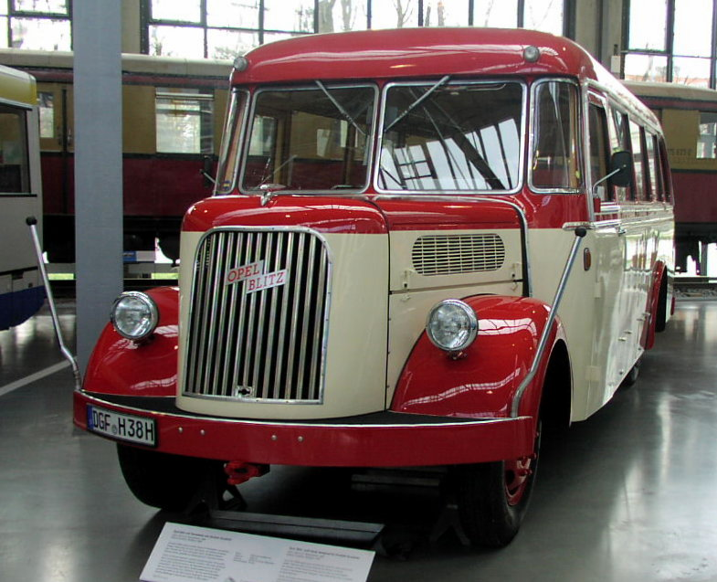 Opel Blitz (1936) with Auwärter body (1938).